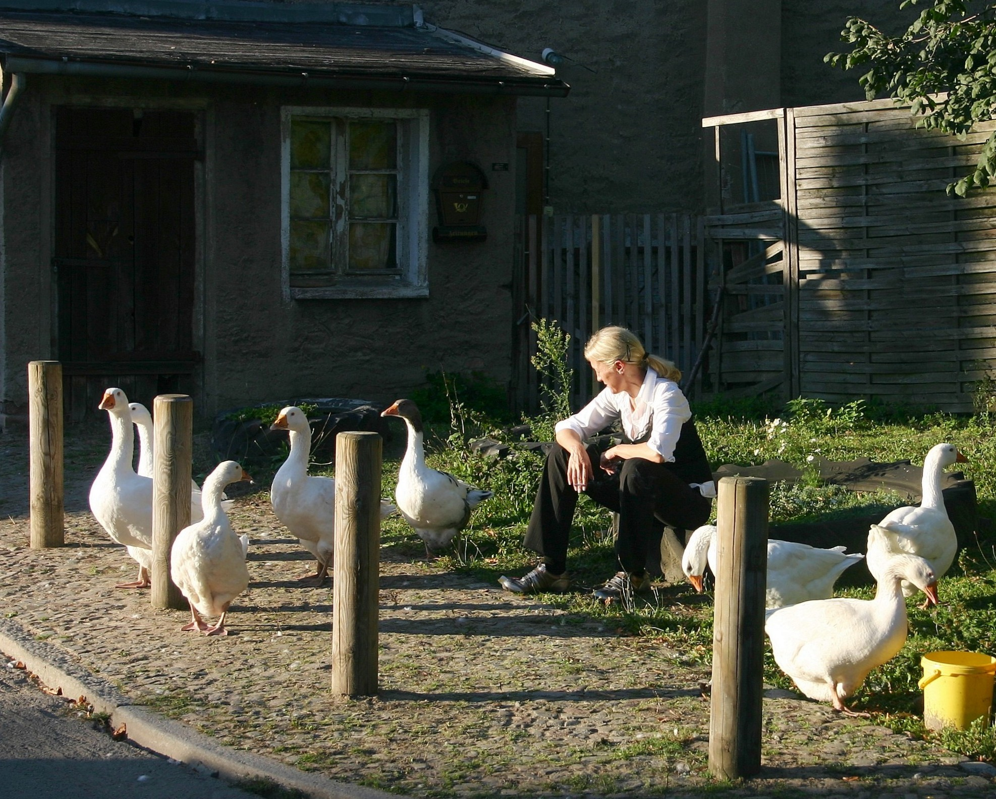 Hausgänse